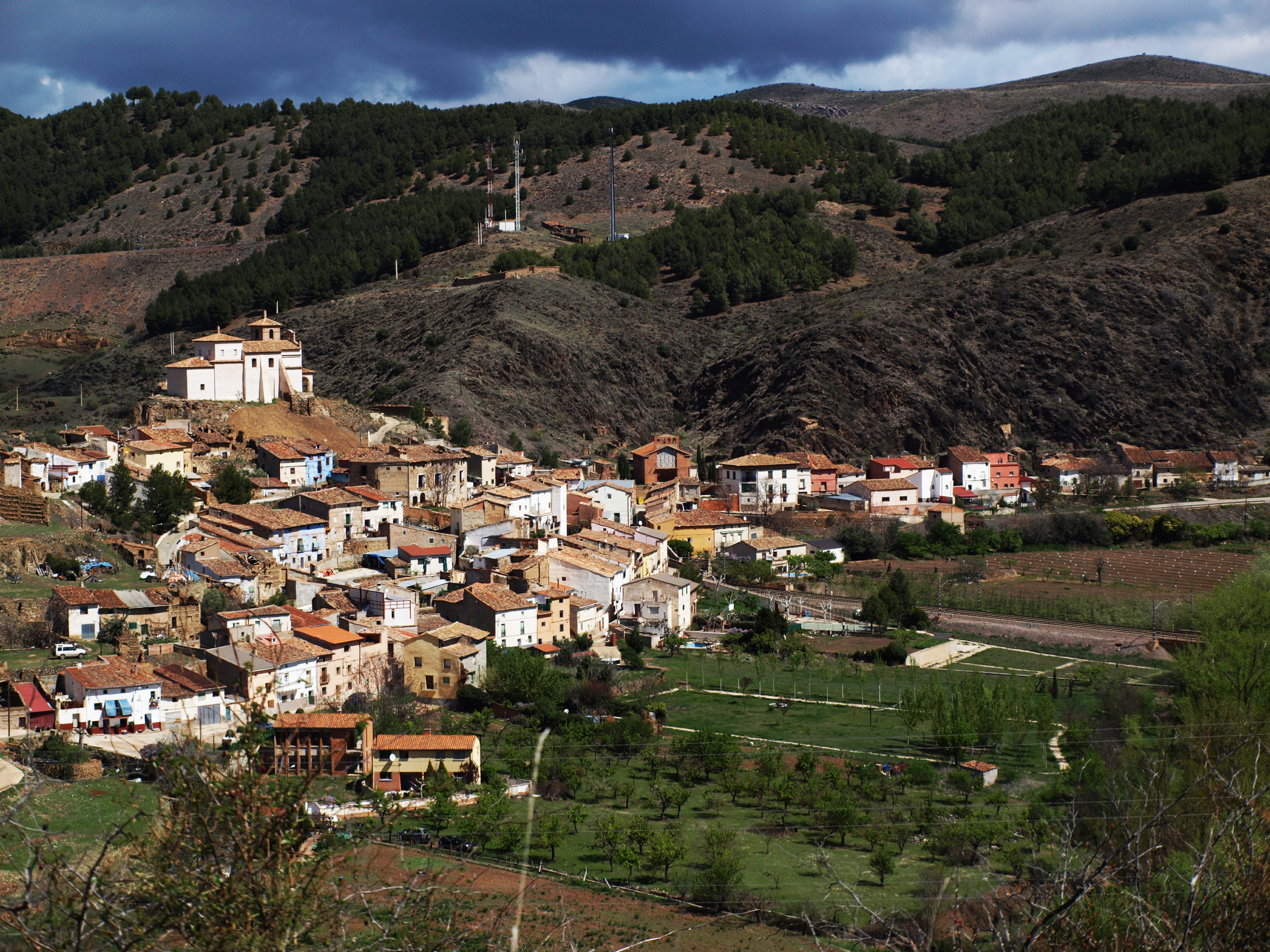 Bubierca, vista general This is a photography of a Site of Community Importance in Spain with the ID: ES2430104. Natura2000 entry, EEA entry